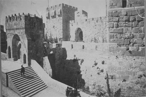 מגדל - דוד , ירושלים